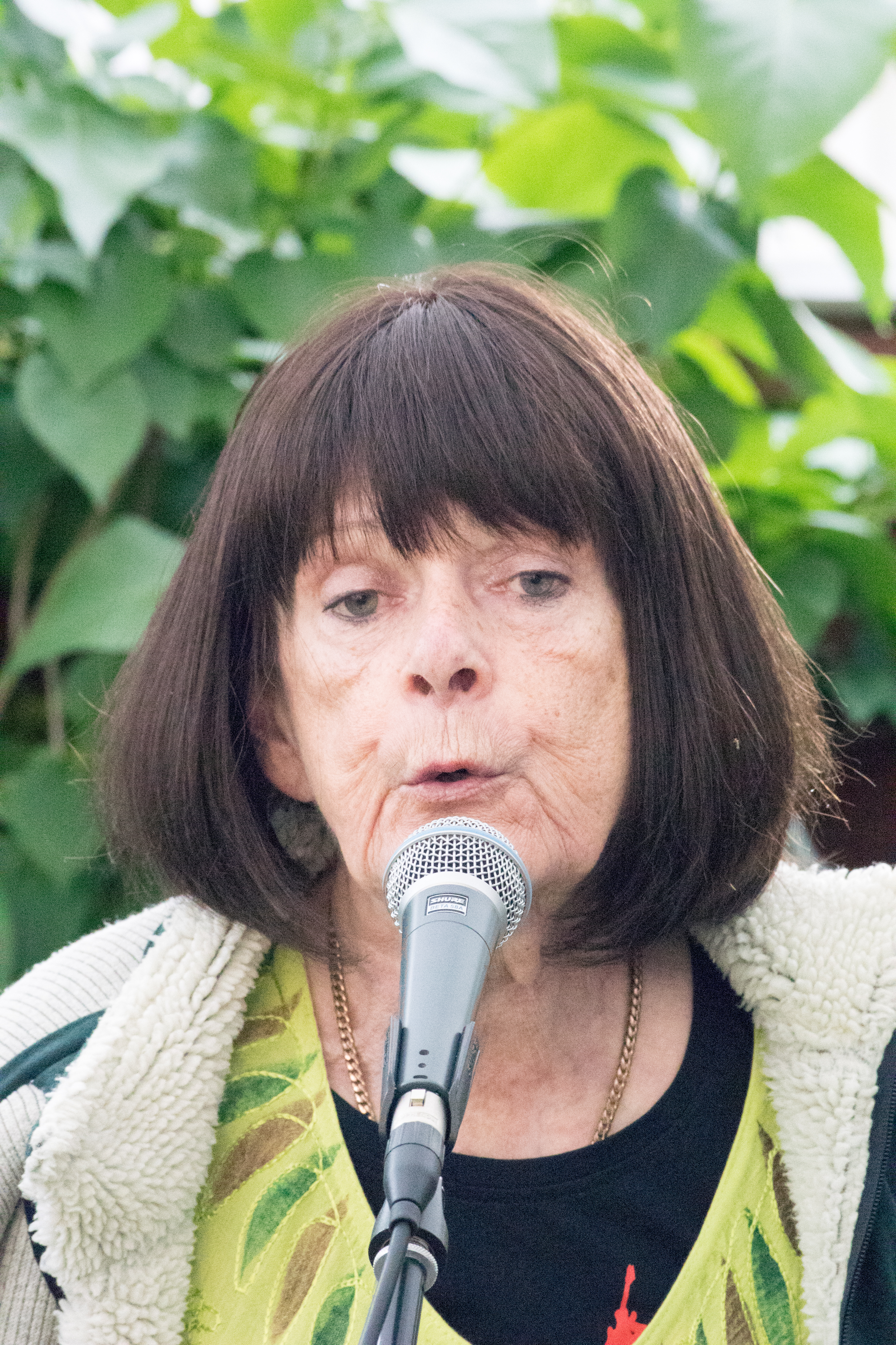 Päivi paunu, suomalainen laulaja